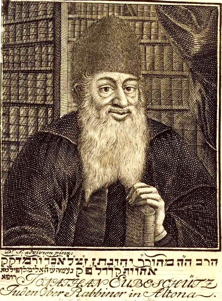 Eybeshits, Yehonatan ben Natan Nata? (Jüd. Gelehrter, Rabbiner und Talmudist, ca. 1690/95-1764).